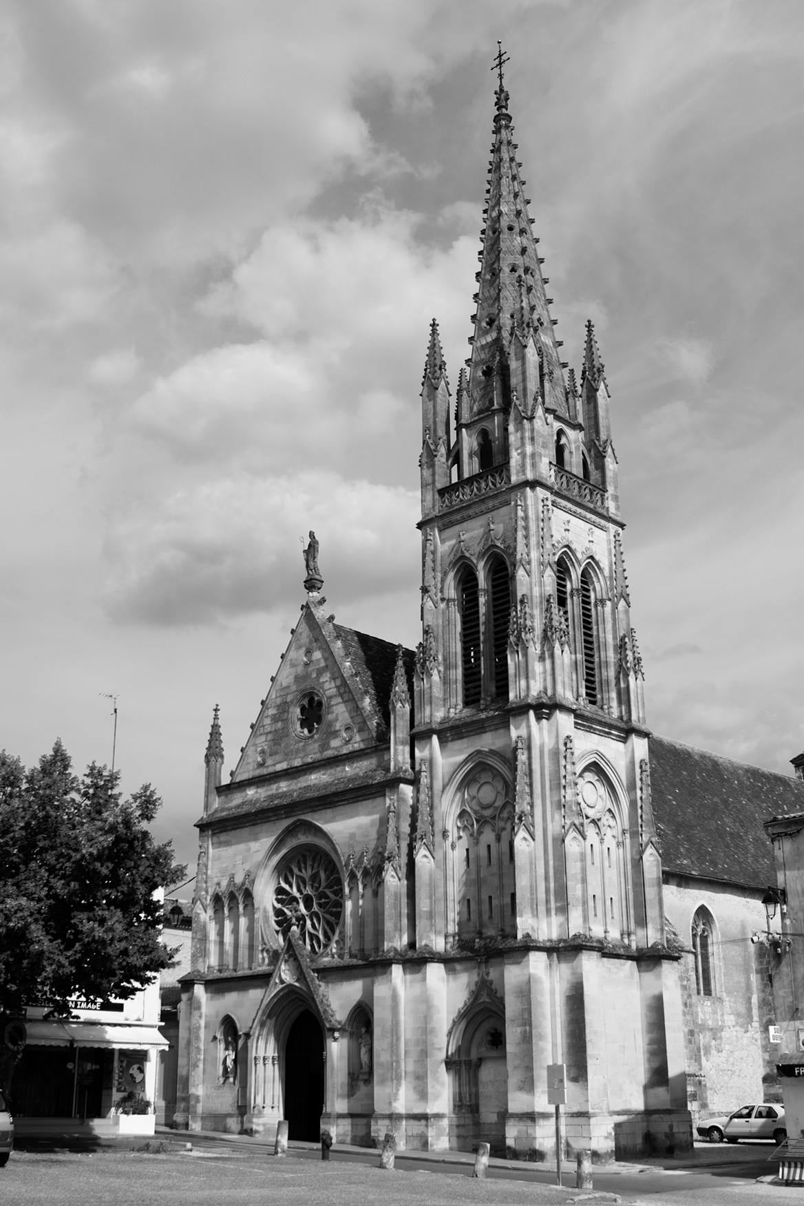 Cadillac, France.